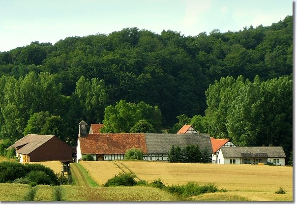 Das ehem. Rittergut Malberg südlich von Ober-Waroldern